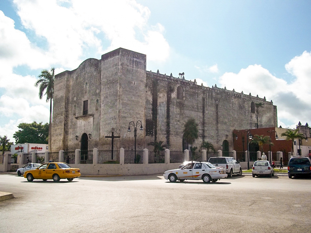 Iglesia de Tizimín